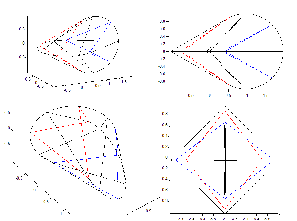 Konturlinien des Oloids